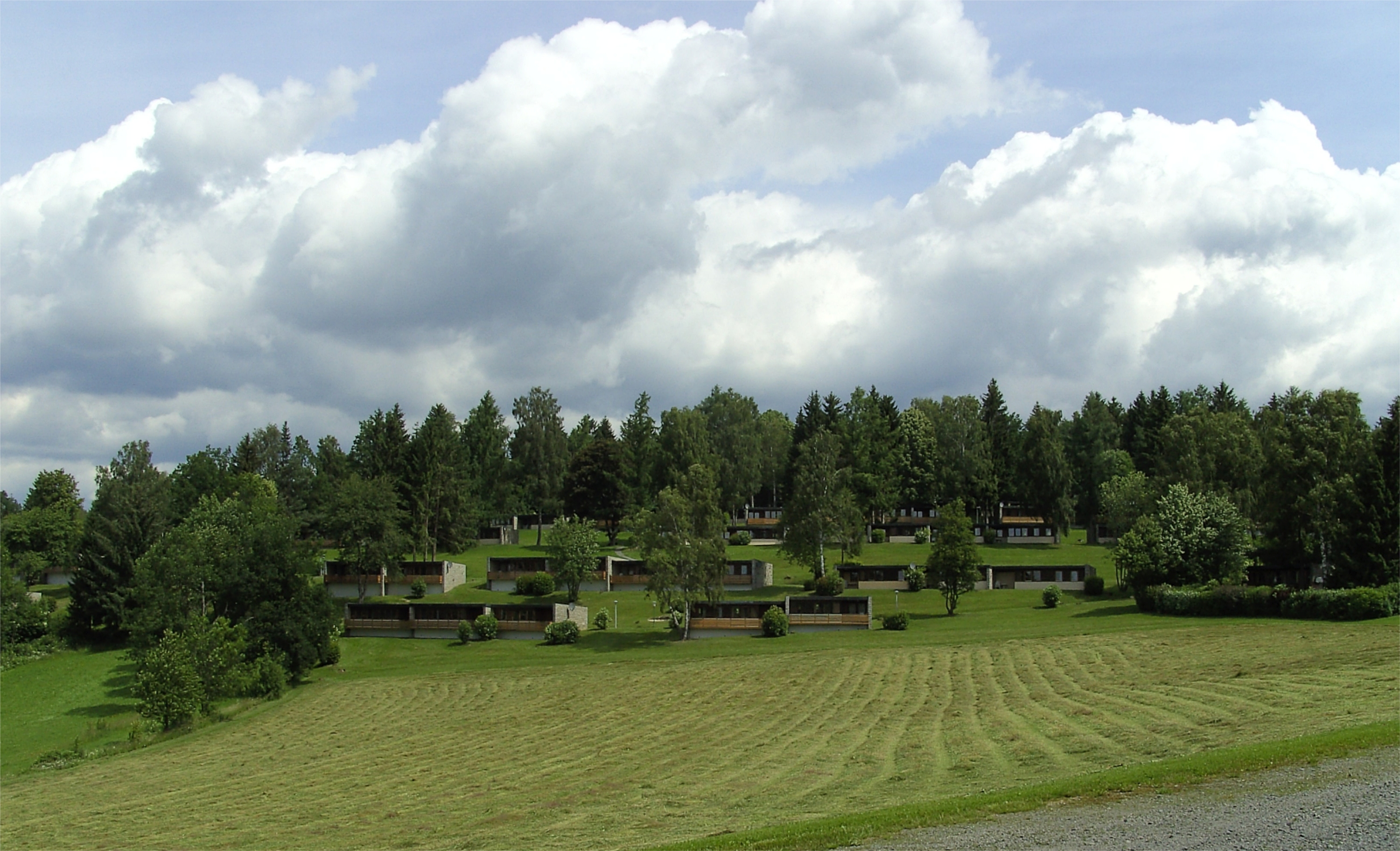 Das Familienferiendorf Grafenau, das 1964 vom Hilfswerk Berlin erbaut wurde.